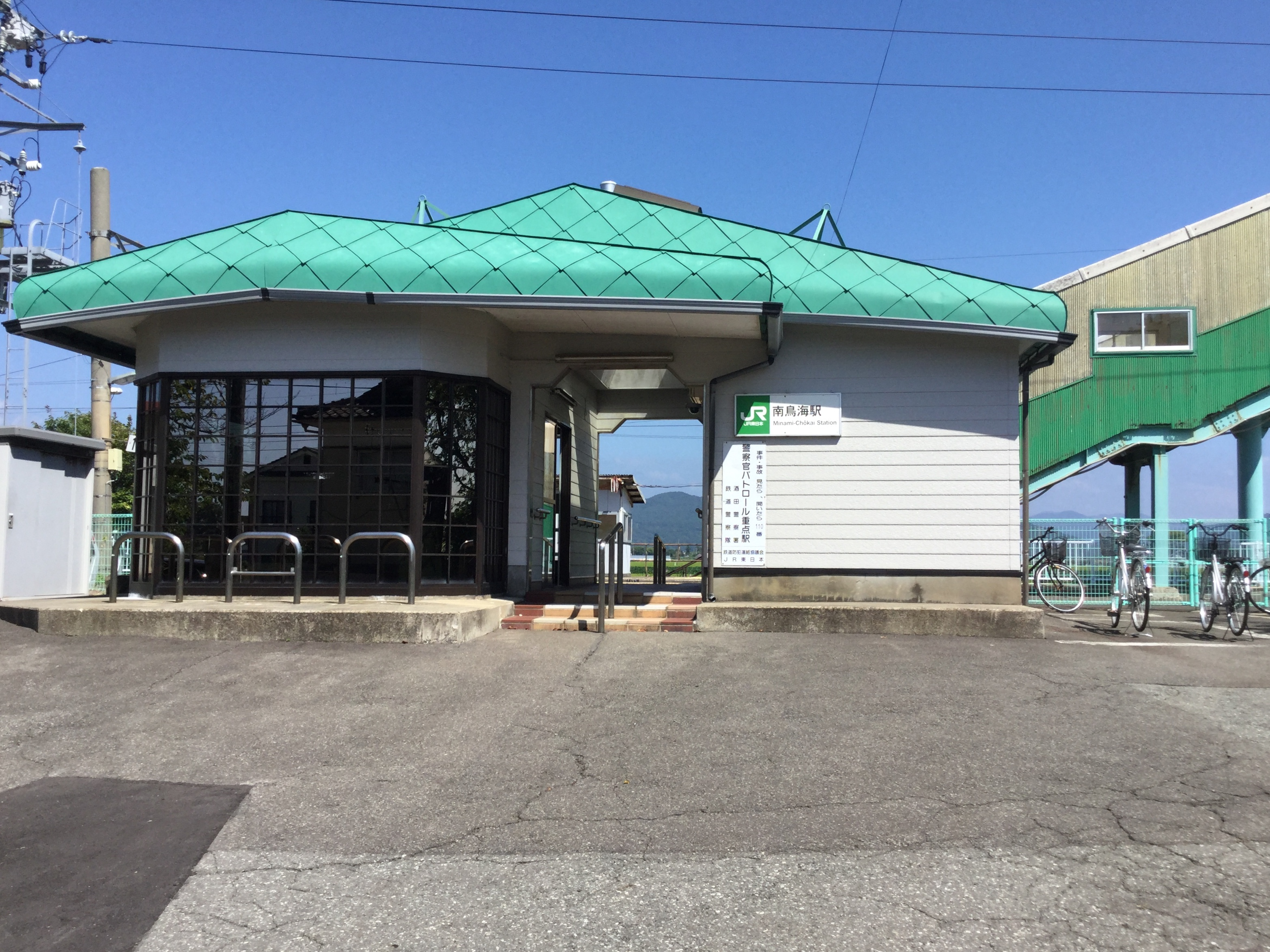 南鳥海駅駅舎